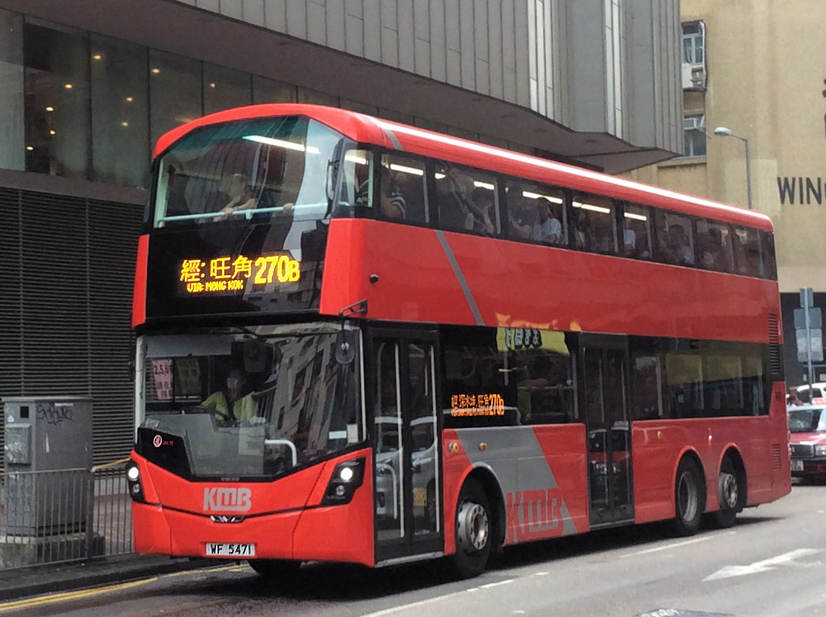 VolvoB8L(1)